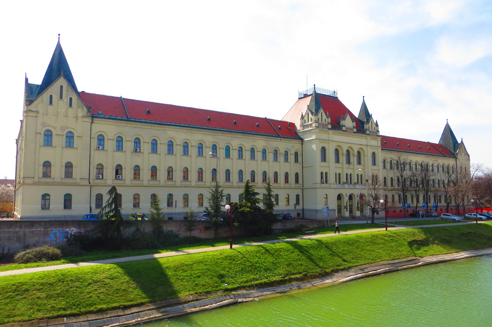 Palata pravosuđa